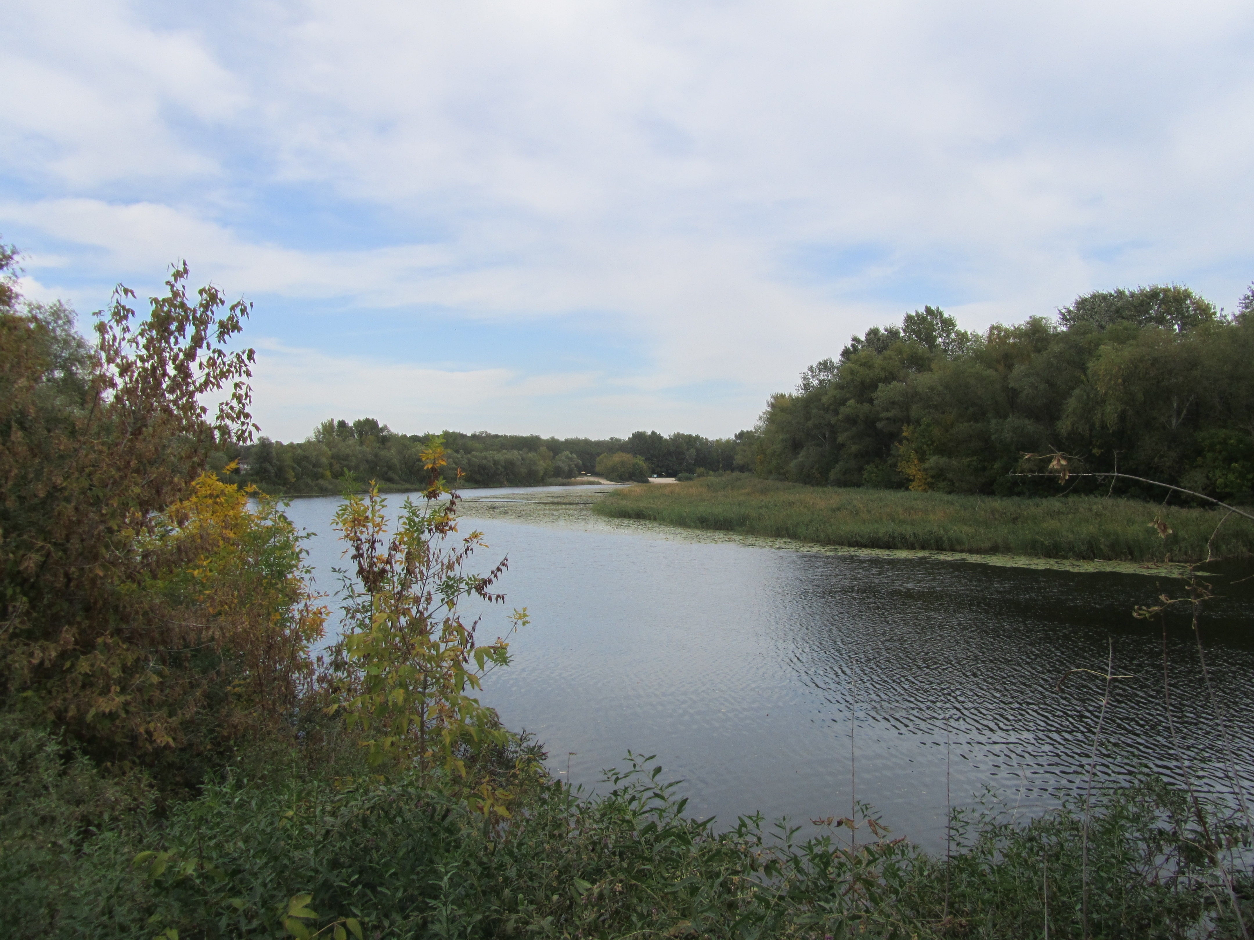 Псел у селі Потоки Кременчуцького району